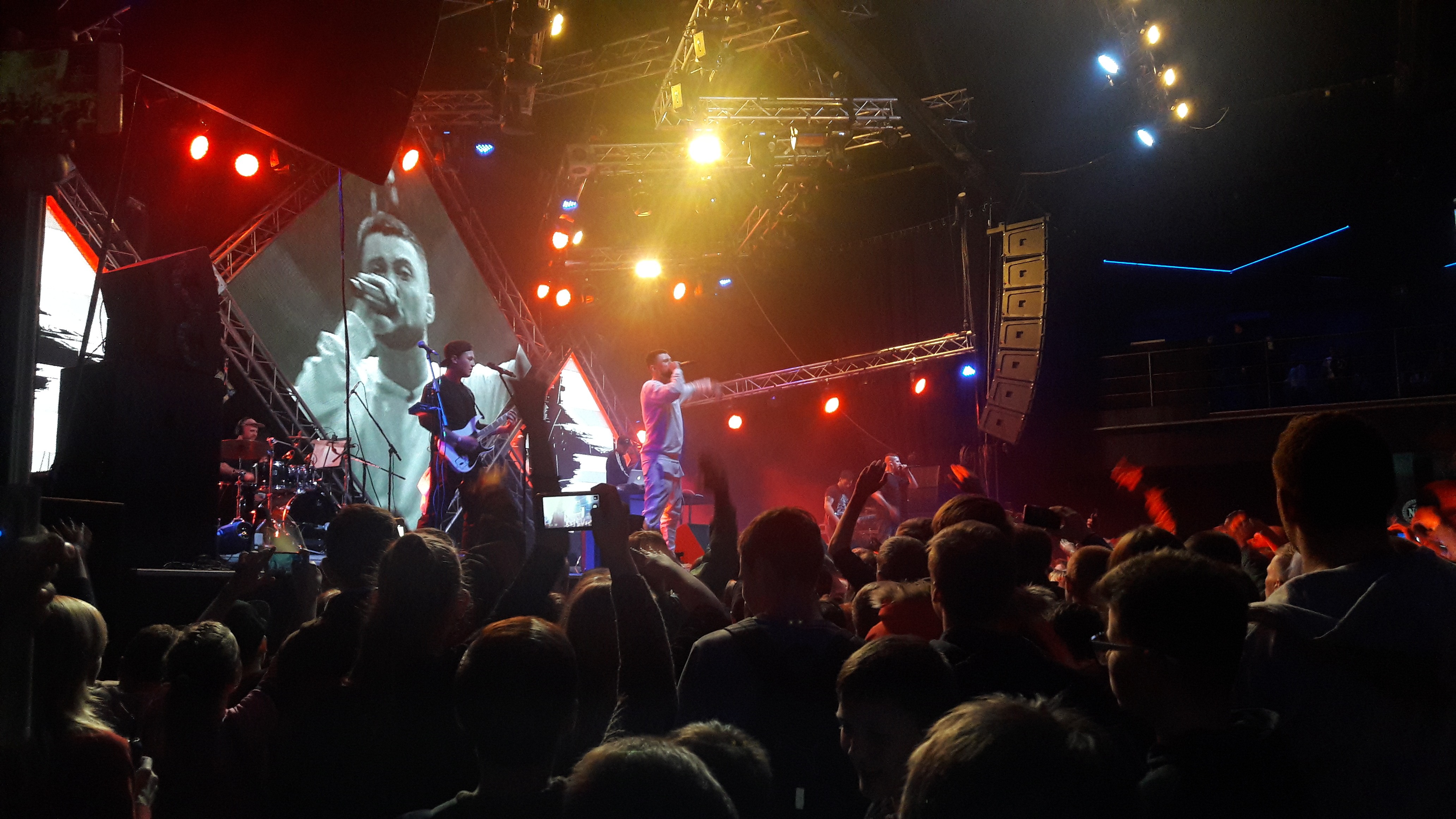 Велике шоу. 5 років на сцені. Київ. Стерео Плаза. 11 листопада 2017 р.